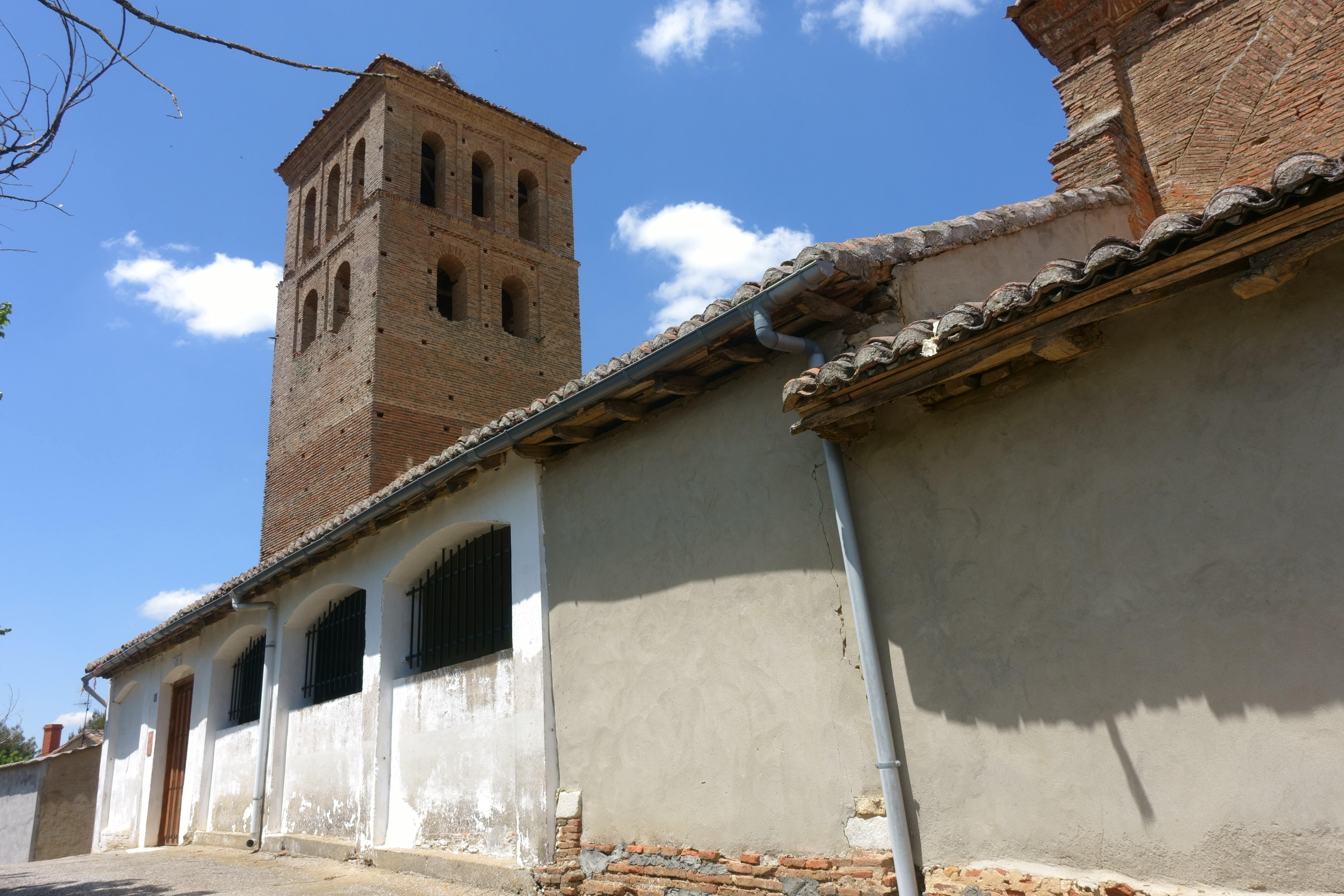 Iglesia de San Esteban, Villamol (León, España).